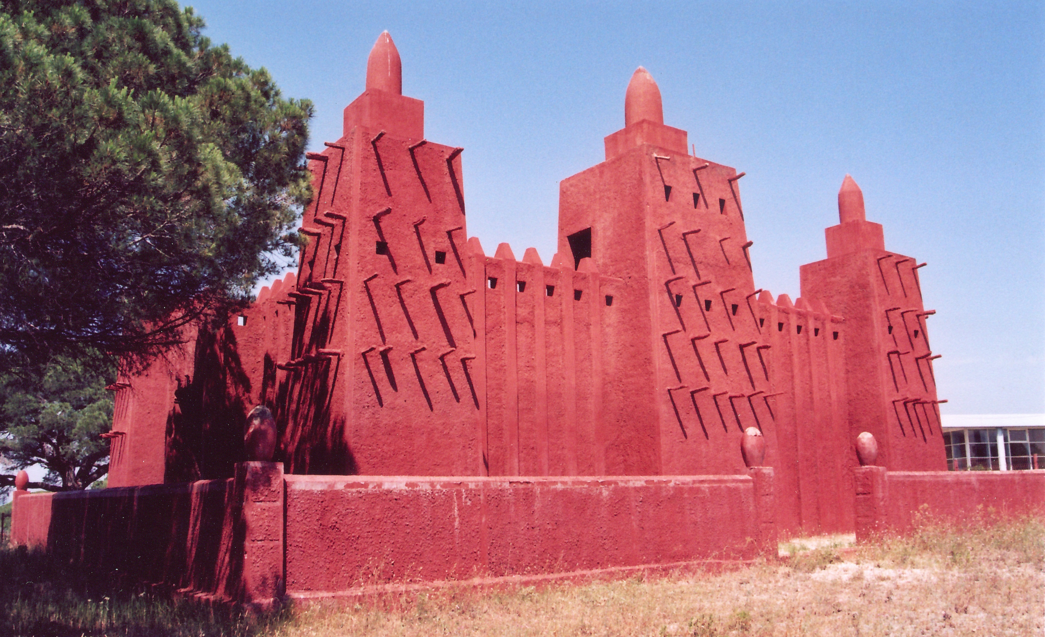 Mosquée Missiri, Fréjus. Replica of Great Mosque of Djenné.